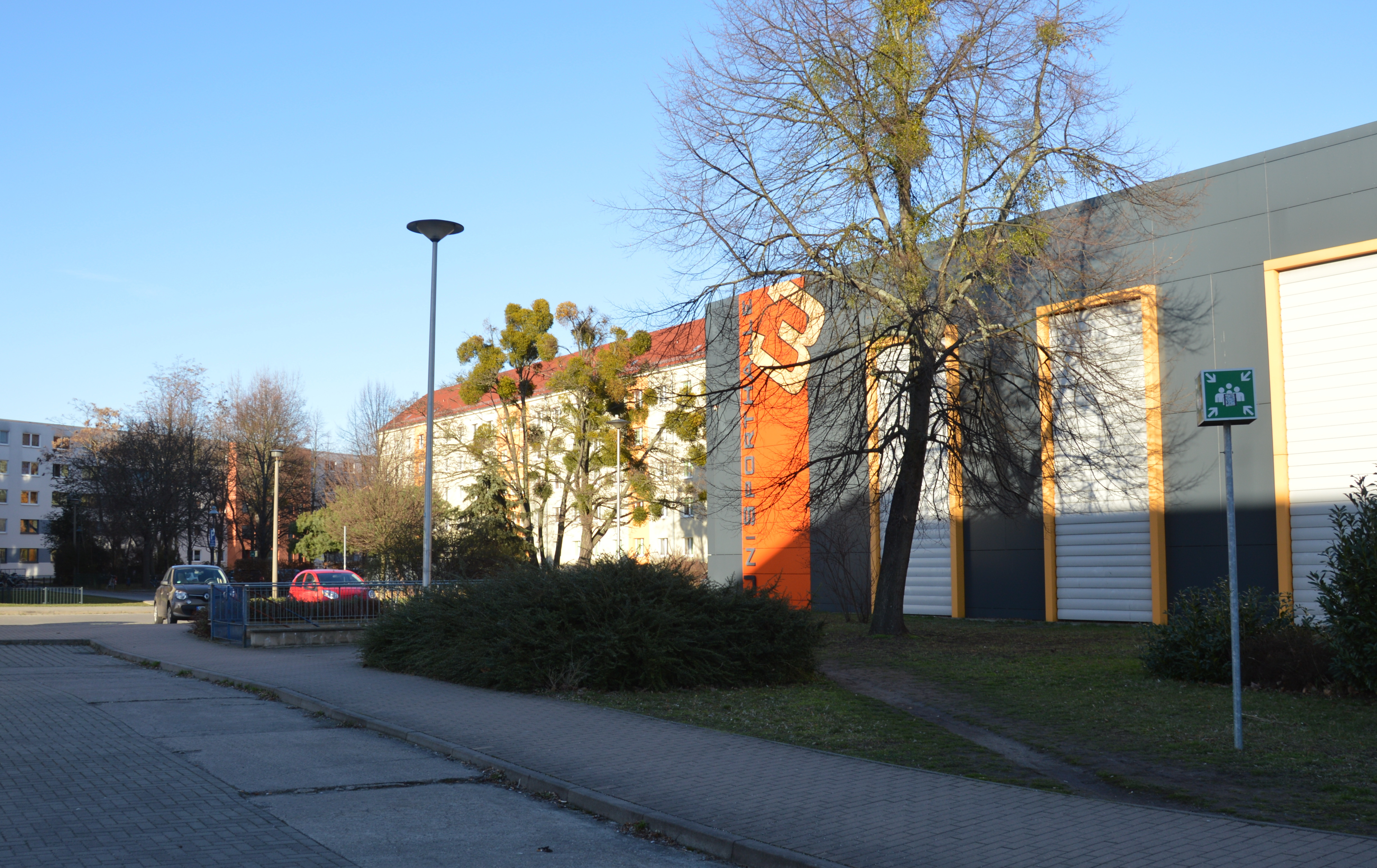 Bastion Hessen detachiert, Unisporthalle Magdeburg